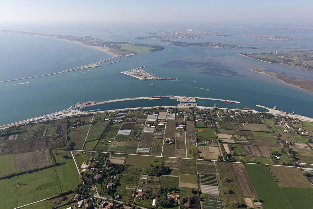 I cantieri in corso per la costruzione del MOSE alla bocca di porto di Lido